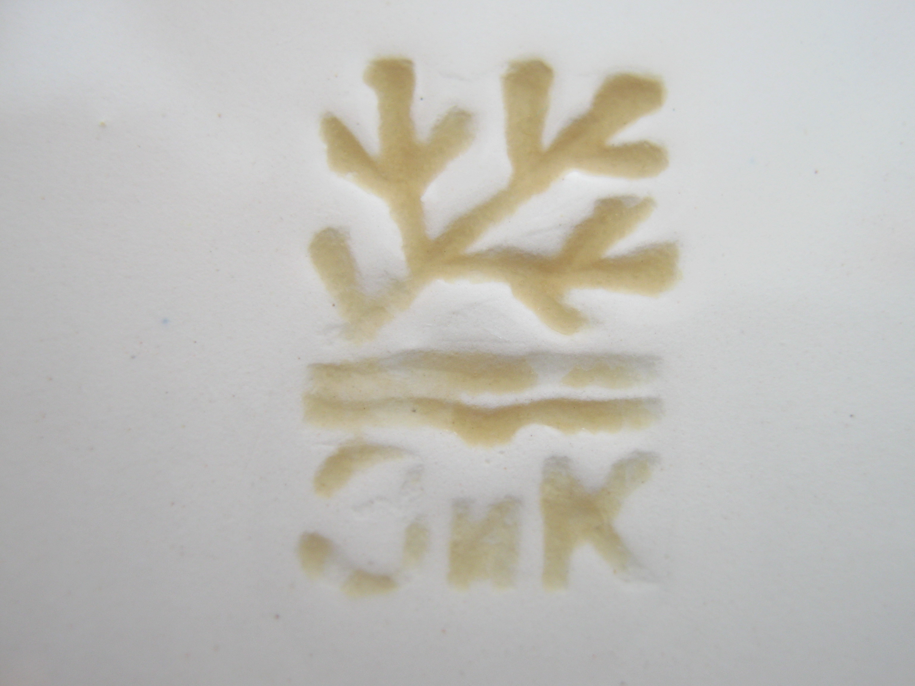 Клеймо Конаковского фаянсового завода.